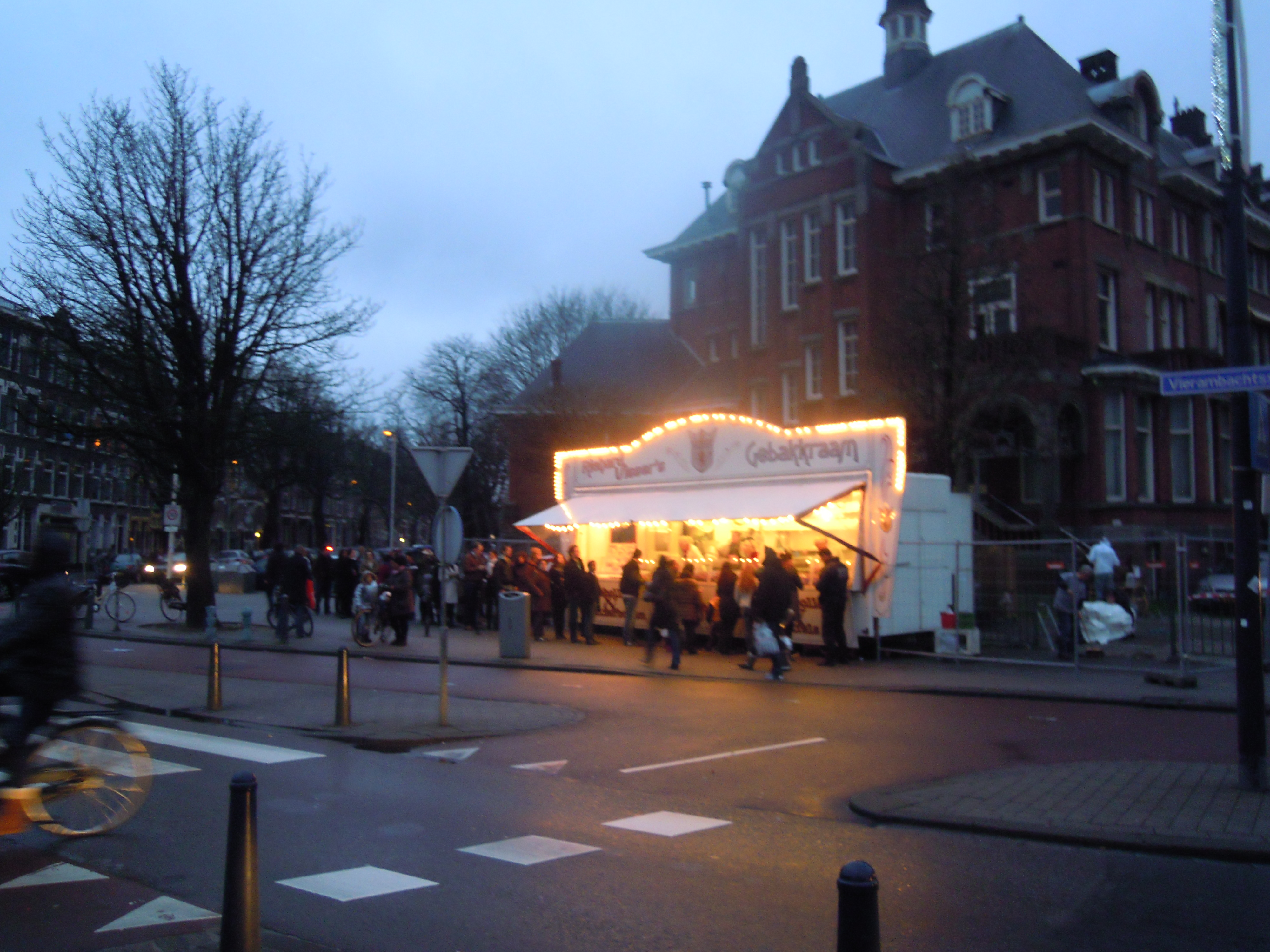 Een rij wachtenden voor Richard Visser's oliebollenkraam op Oudejaarsdag 2011 in Rotterdam. Visser had dit jaar voor de 8e keer de lekkerste oliebollen van Nederland volgens de AD oliebollentest. Eerder op de dag stond er nog een veel langere rij met een wachttijd van ongeveer een uur.